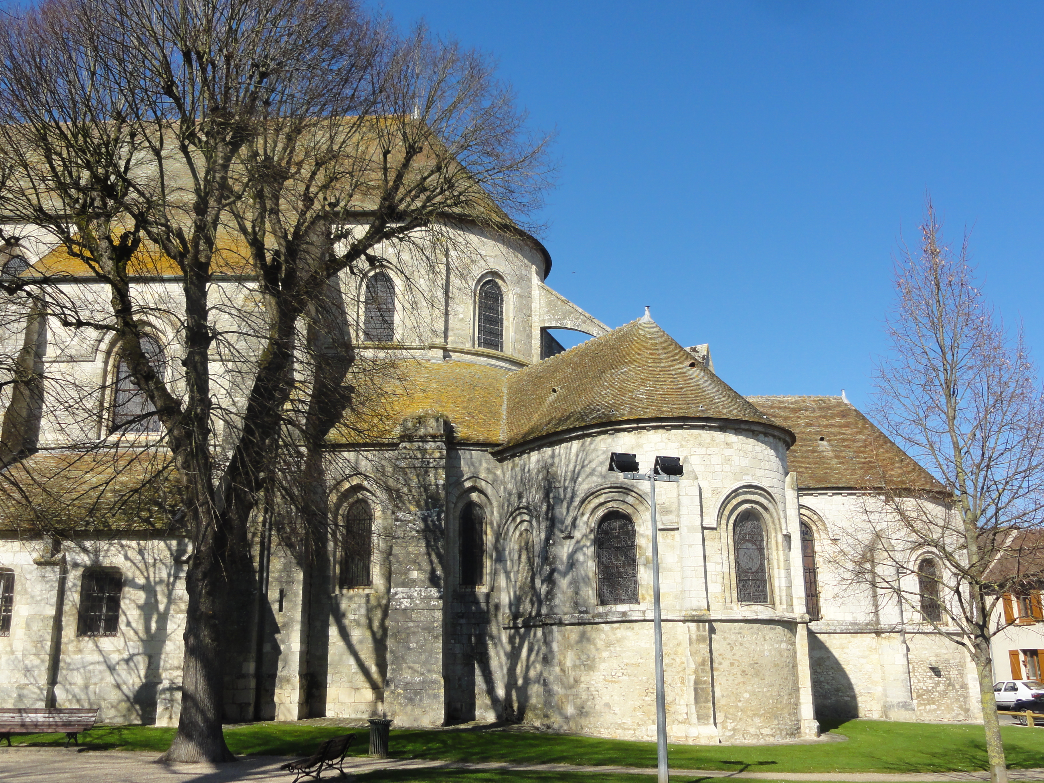 Chœur, vue depuis le sud.